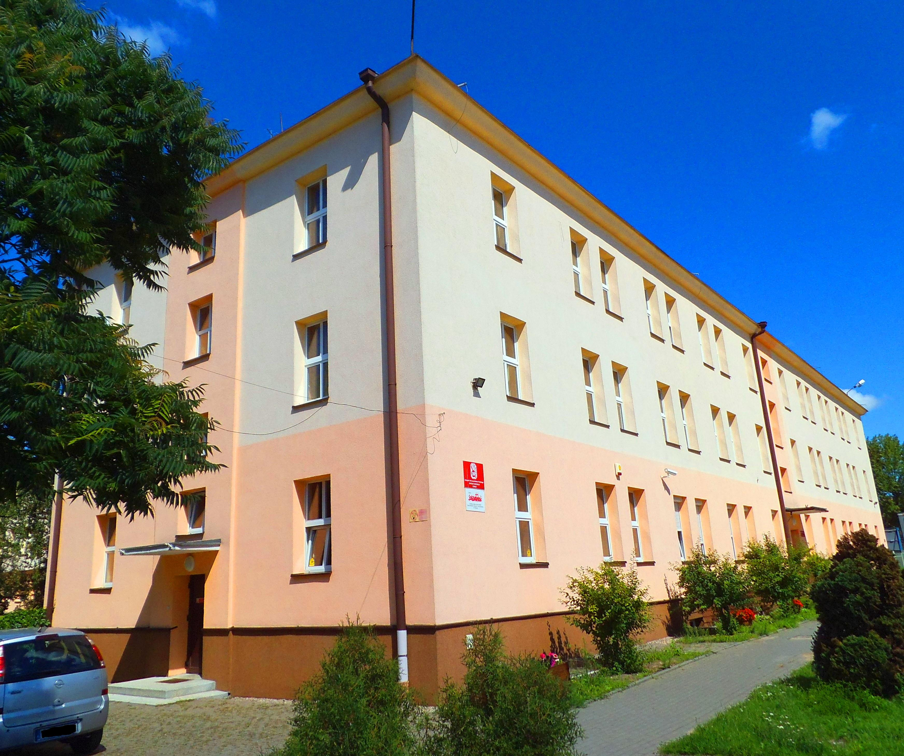 Internat Zespołu Szkół Przemysłu Spożywczego w Toruniu